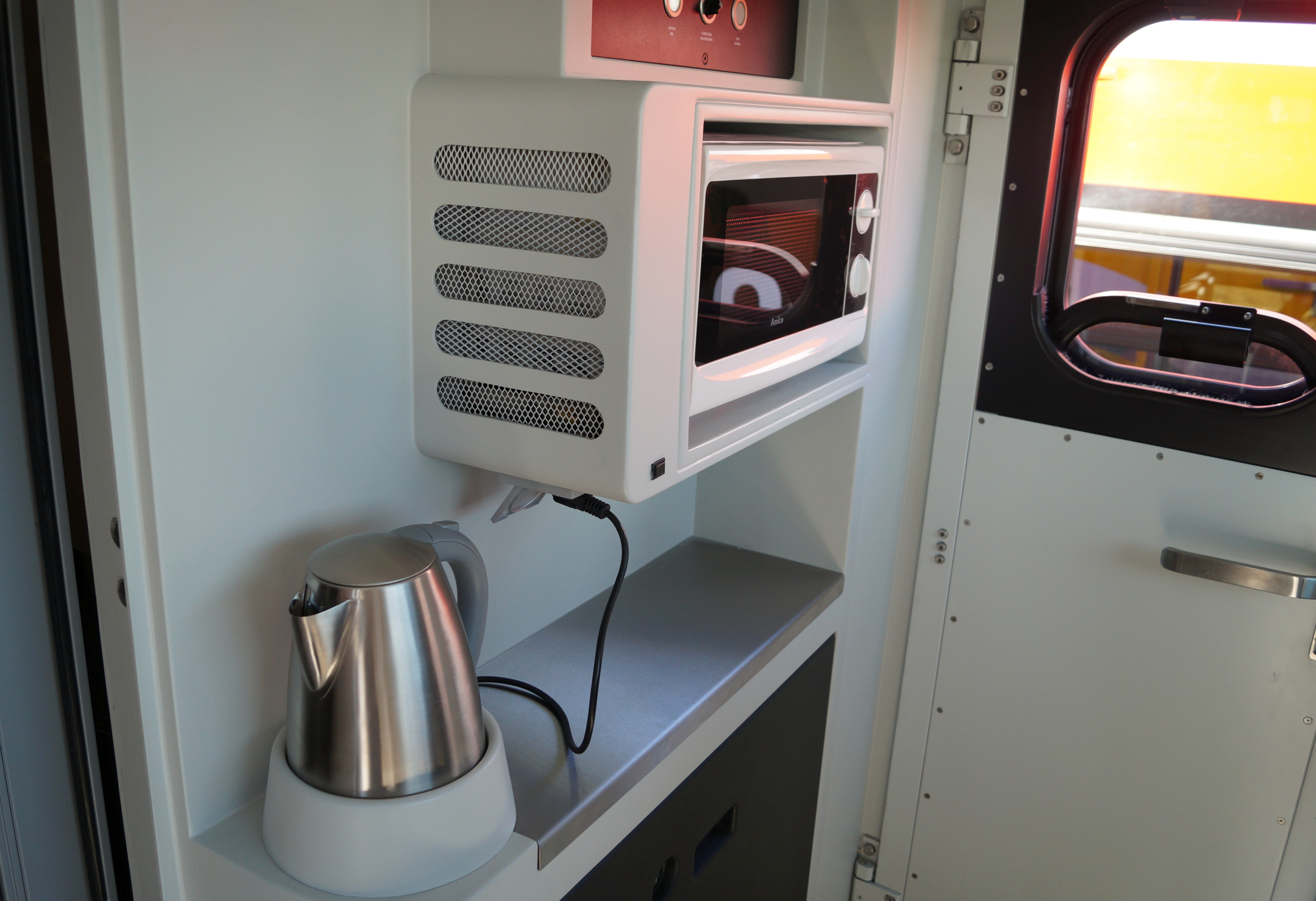 The making of this document was supported by Wikimedia Polska Association, within Wikigrant no. WG 2015-34. English | polski | +/− Kącik socjalny w kabinie maszynisty lokomotywy elektrycznej typu 111Eb (Pesa Gama) w barwach Kolei Mazowieckich wystawianej na Targach Trako 2015